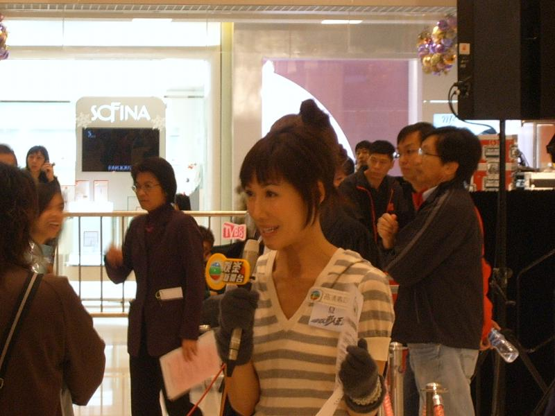 由本人拍攝 拍攝日期：2007年12月23日 拍攝地點：將軍澳東港城